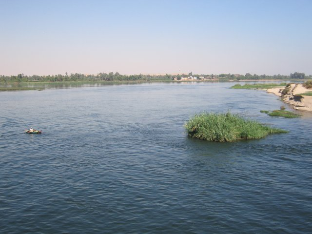 River Nile Author: Xosé Calvo